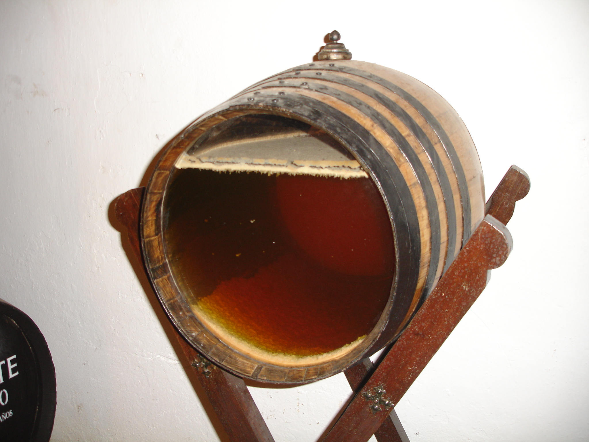 Valdivia in Jerez, Andalusia (Spain)